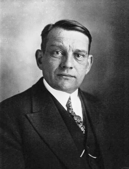 Coty, député (Seine Inférieure) : photographie de presse